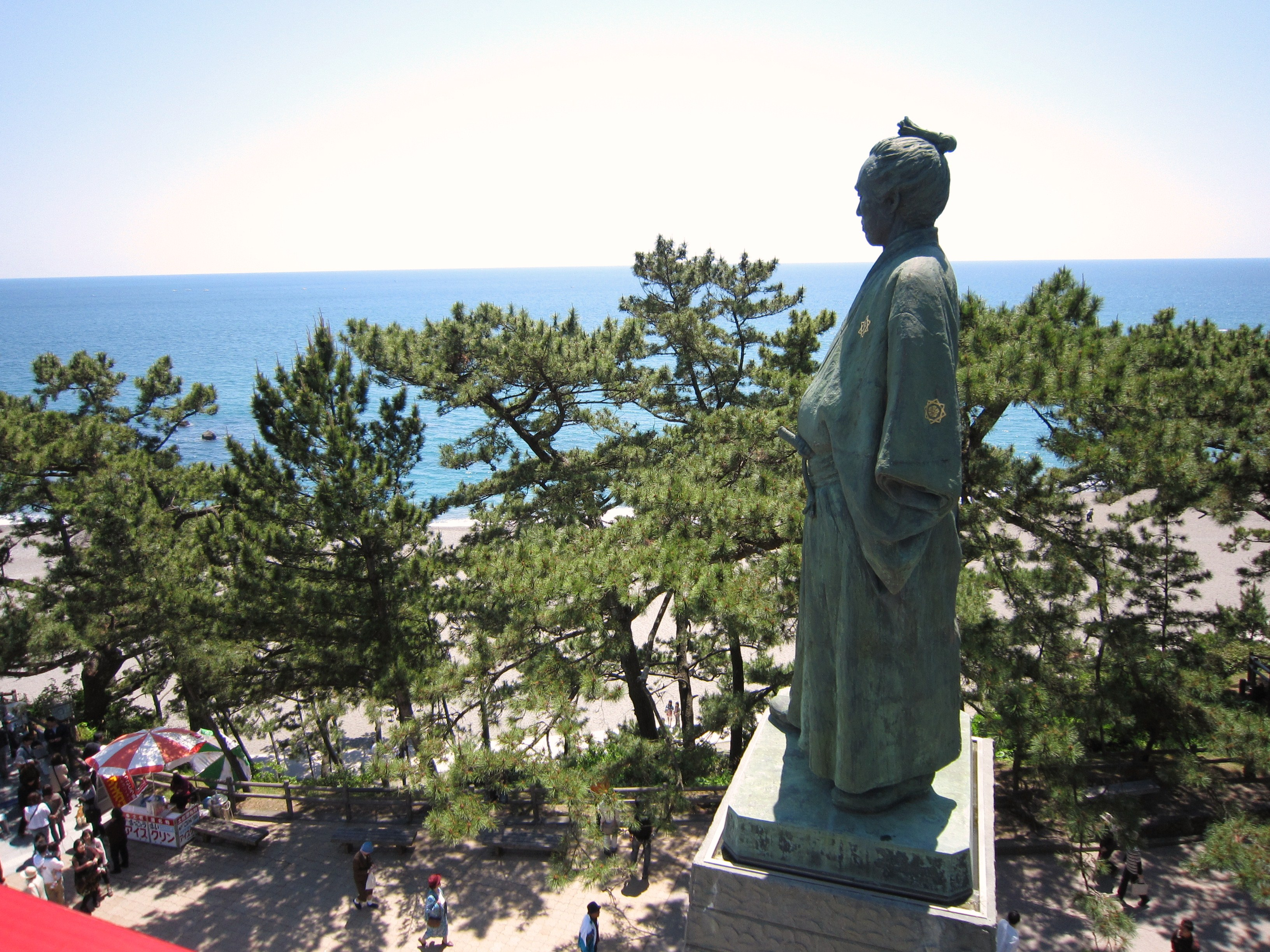 坂本龍馬立像、高知市桂浜